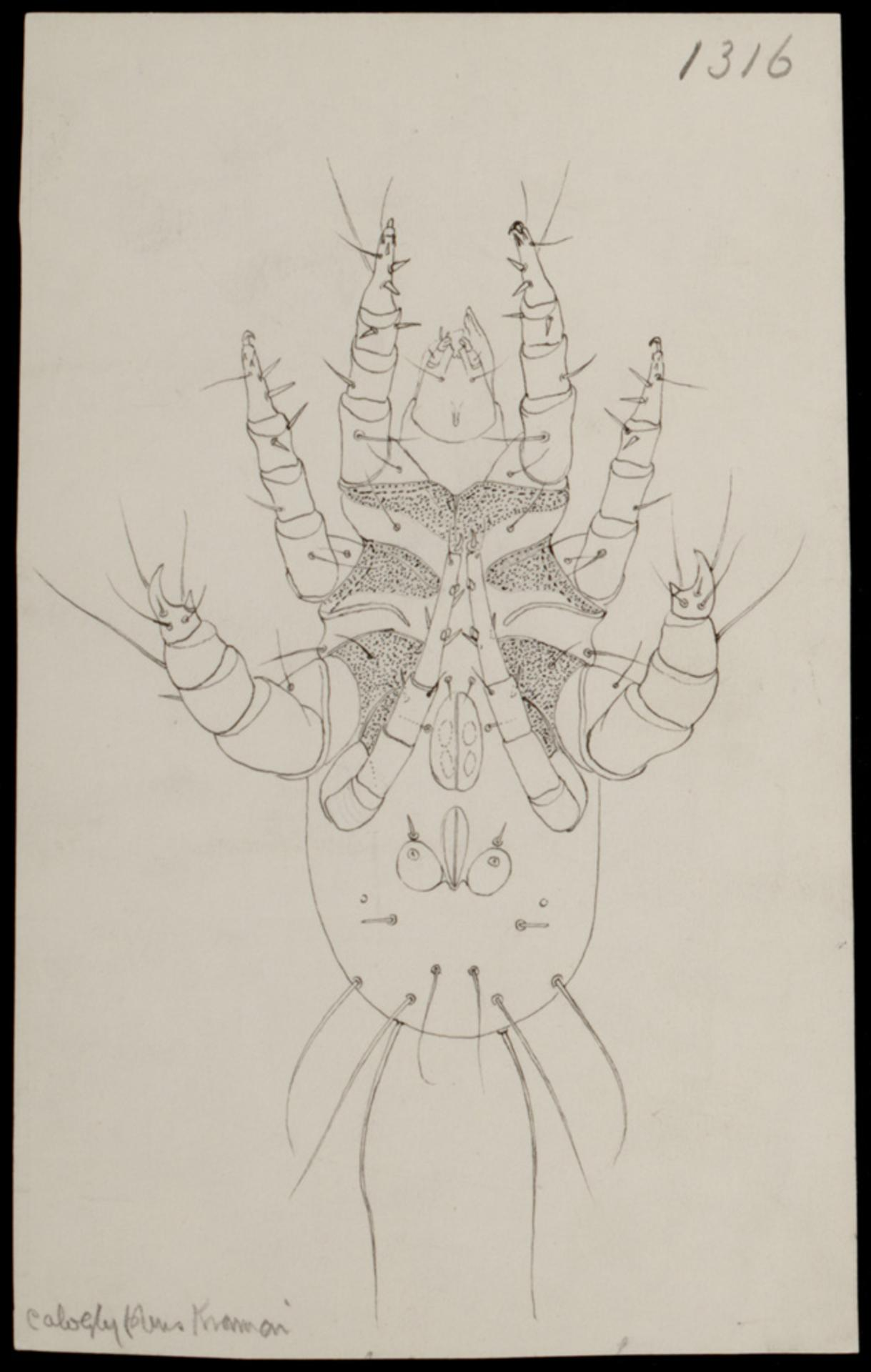 Caloglyphus krameri (Berlese)